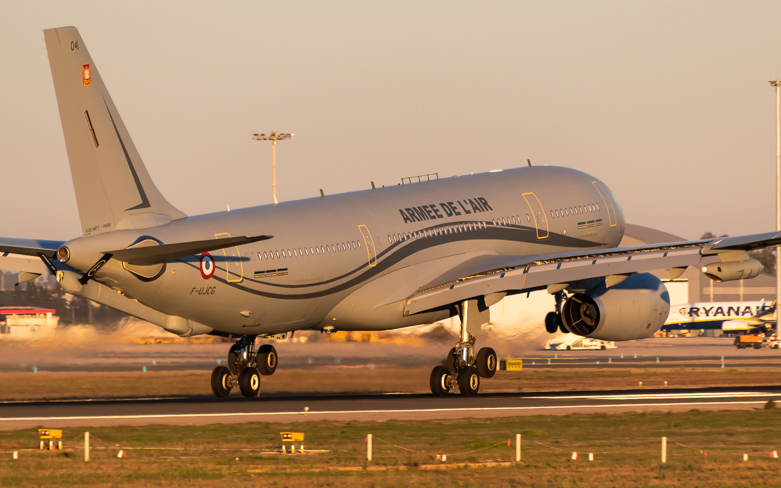 041 / F-UJCG